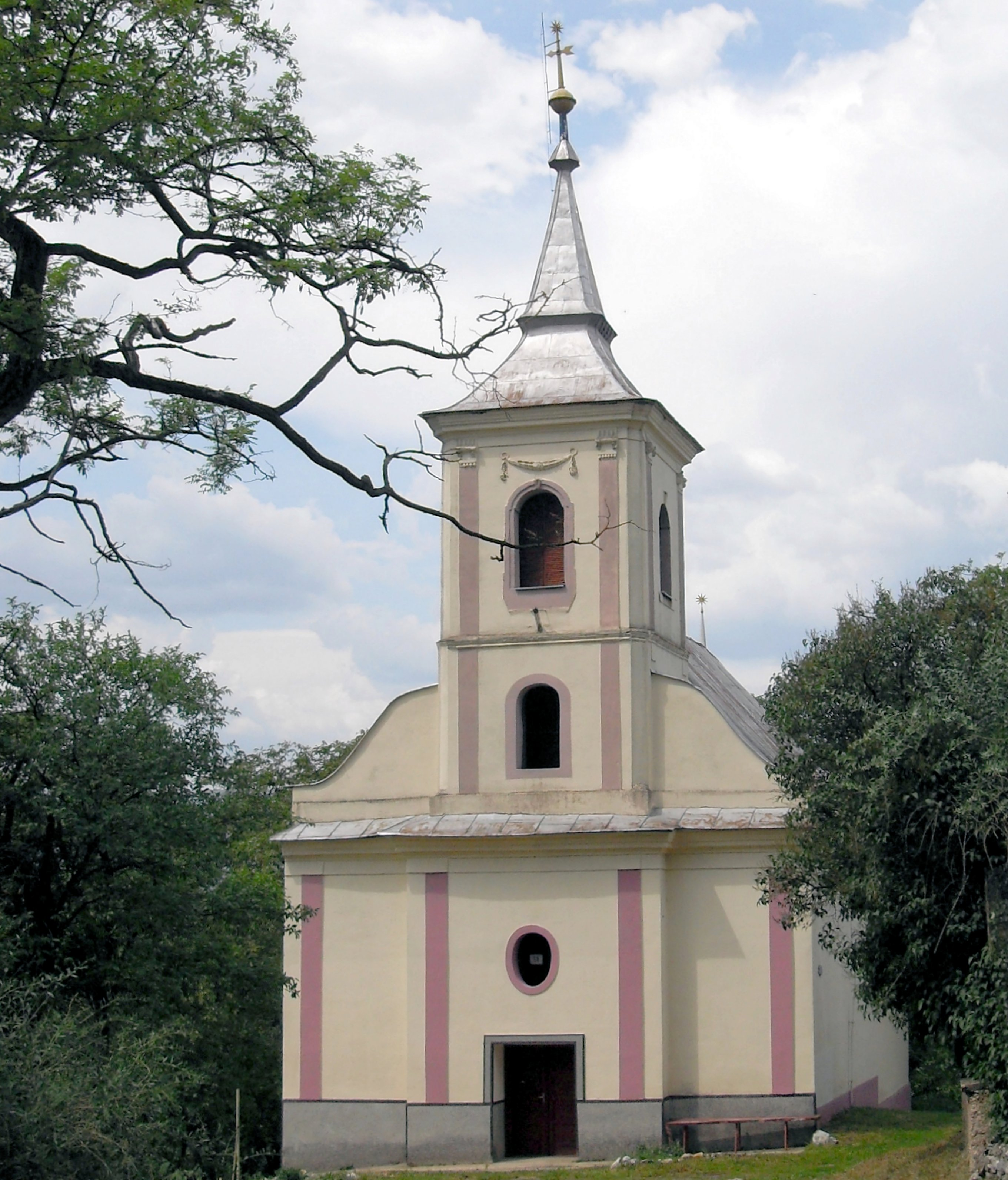 Žarnov, Kostol Najsvätejsej Trojice